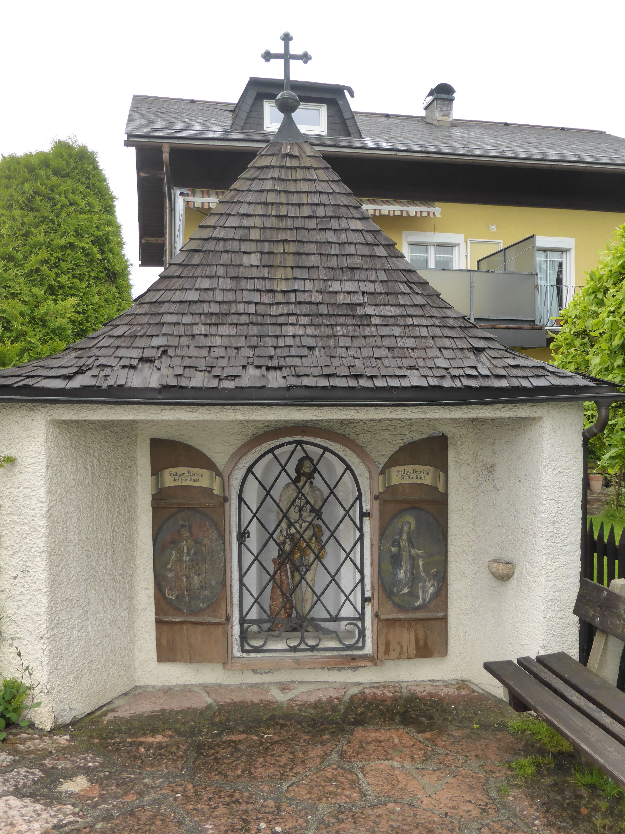 Gerichtskapelle